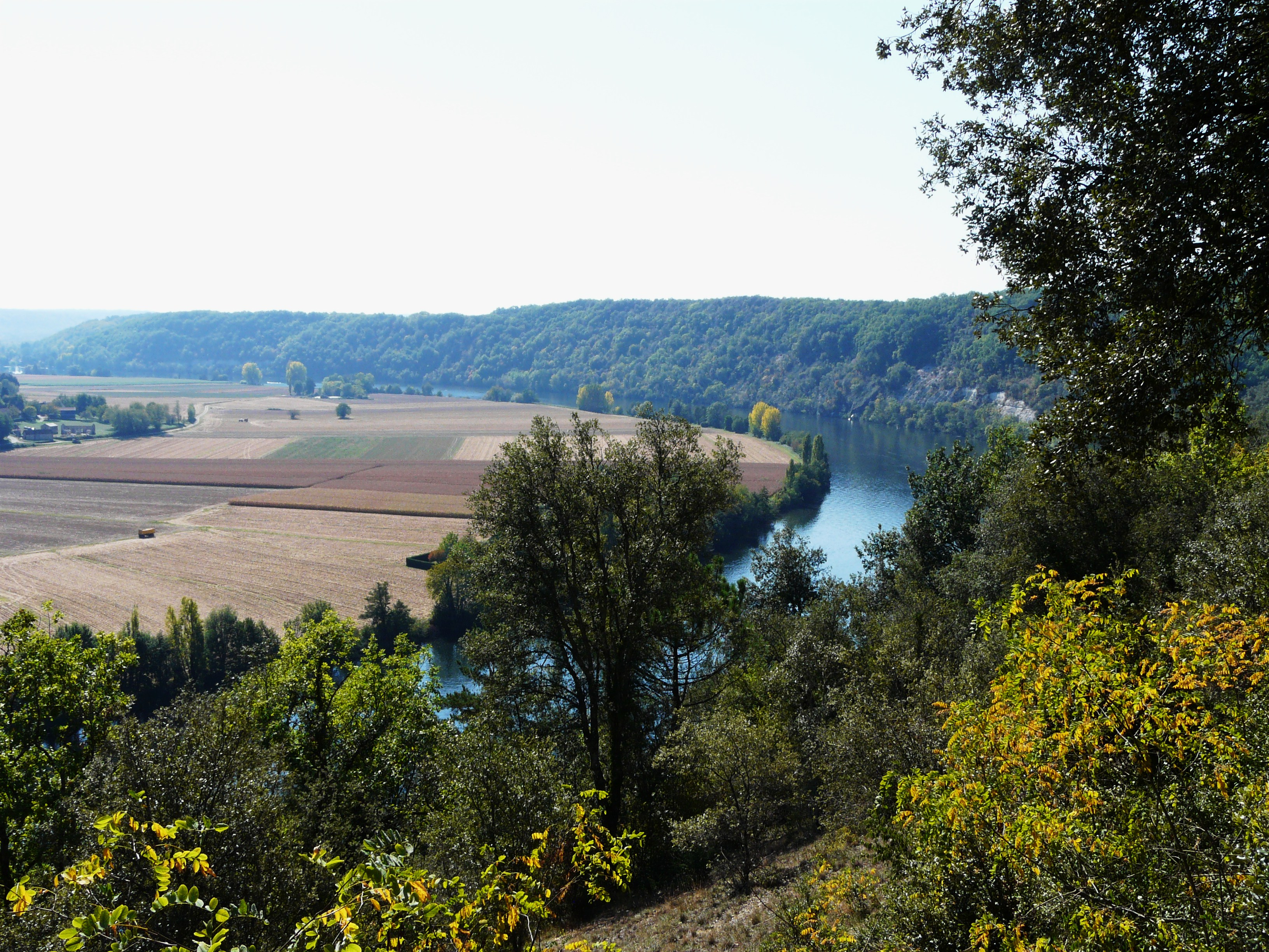 La partie ouest du cingle de Trémolat en vallée de la Dordogne, Dordogne, France. Au premier plan, commune de Trémolat. Au second plan, la plaine se trouve sur la commune de Calès et les coteaux à droite sur Mauzac-et-Grand-Castang.